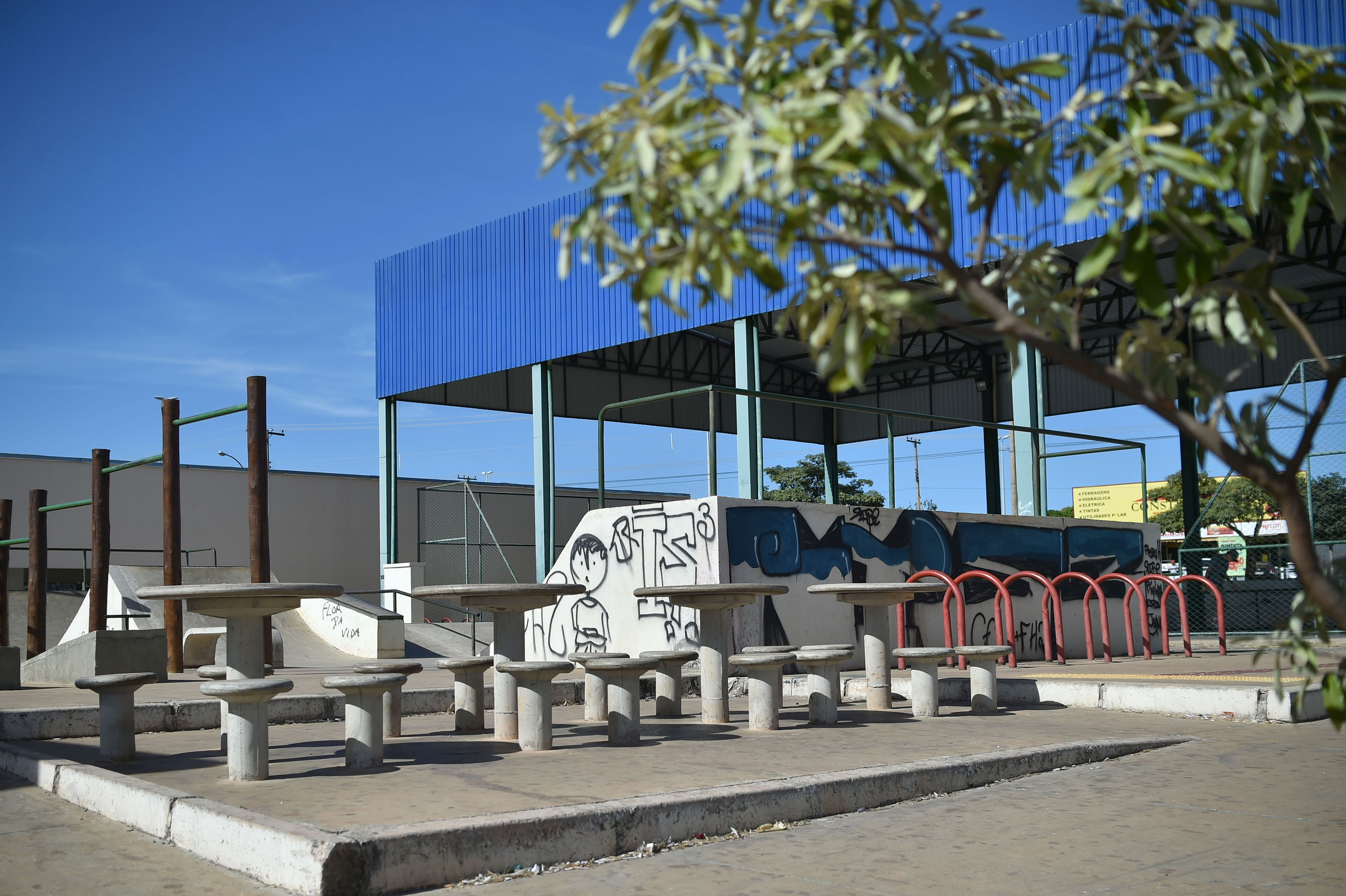 Brasília, DF, Brasil 28/6/2016 Foto: Andre Borges/Agência Brasília. A partir deste sábado (2), na 1ª Oficina de Mobilização Social, das 15 às 18 horas, a população do Recanto das Emas poderá conhecer o Centro de Artes e Esportes Unificados (CEU), na Quadra 113, Lote 9, e começar a escolher os nomes que representarão a comunidade no grupo gestor responsável pela administração do local. A forma de eleição será definida ao longo das outras oficinas que ocorrerão no CEU, em julho, em agosto e em setembro. O grupo será formado por 18 voluntários — seis representantes da liderança comunitária, seis da sociedade civil organizada (organizações não-governamentais, associações) e seis do governo do Distrito Federal. Leia a matéria no site da Agência Brasília: bit.ly/292FC9W